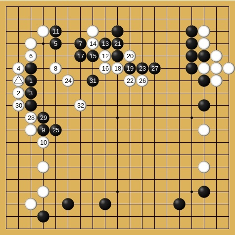 第16期本因坊戦第5局 坂田栄男 半目勝 高川格